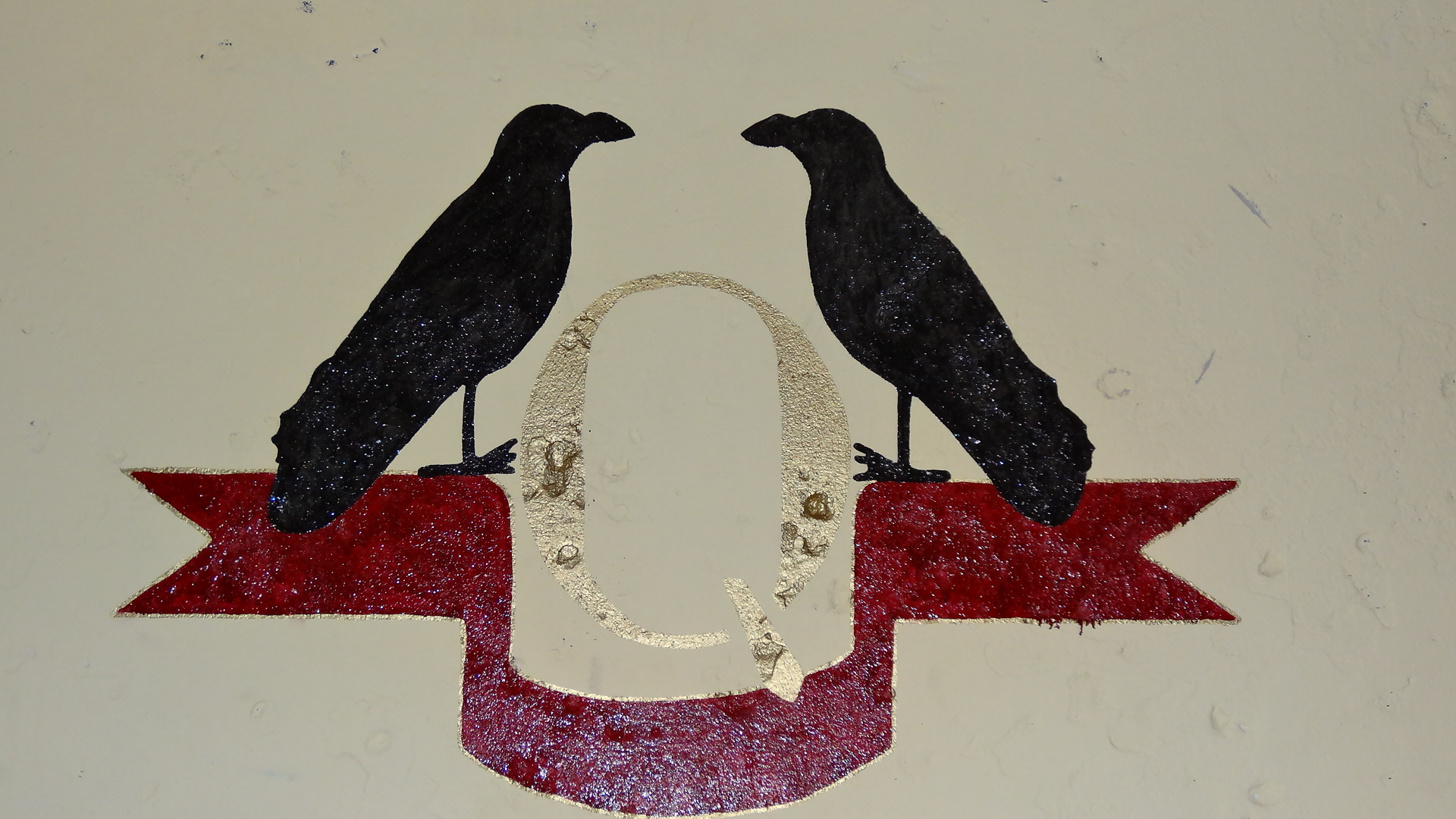 ALSV Quintus WAPEN